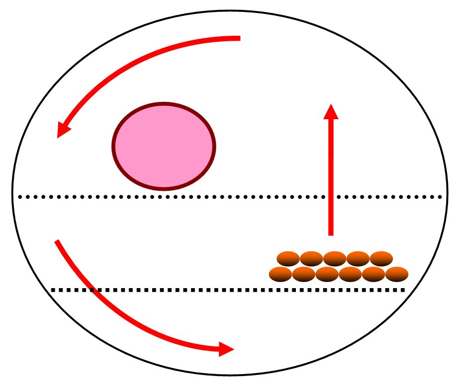 indirect grilling schematische Darstellung des indirekten Grillens Autor: Thogru